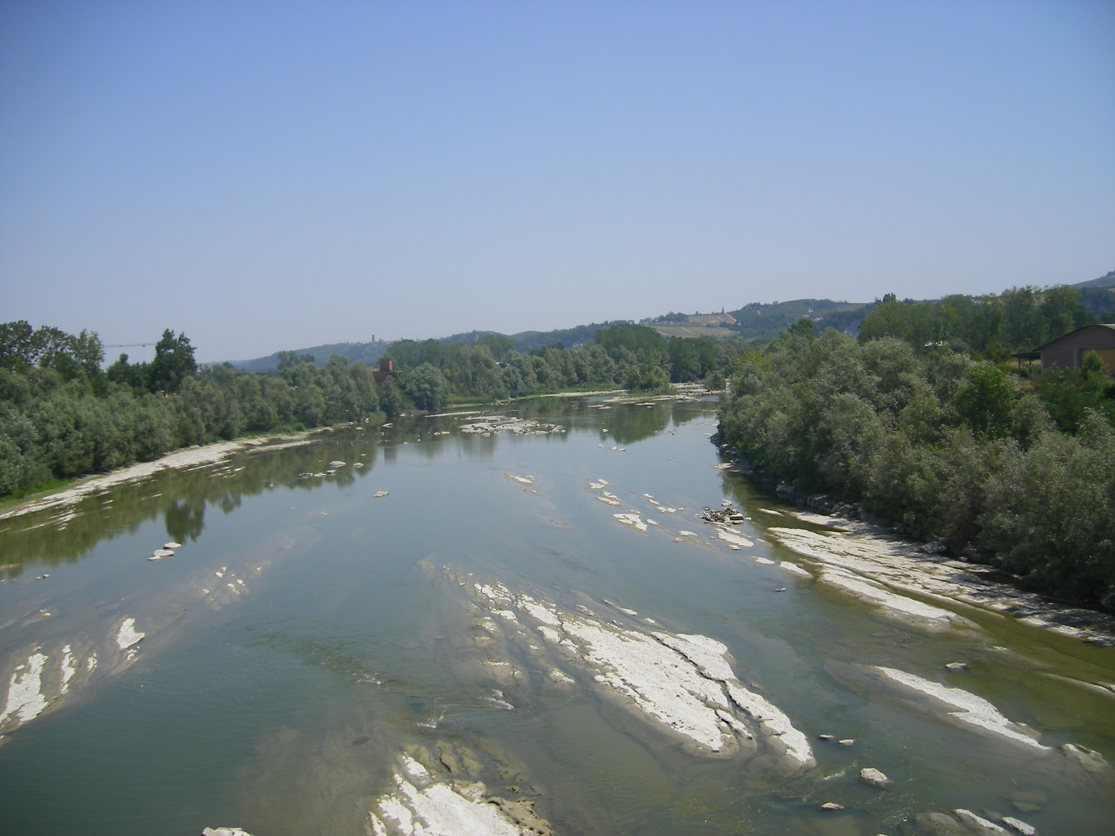 Alba - Tanaro River